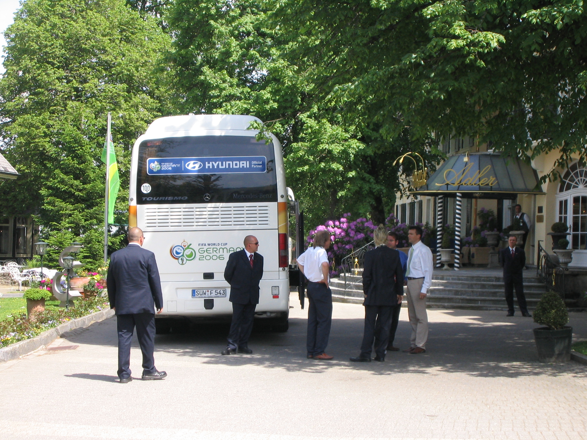 Bus der holländischen Fußballnationalmannschaft vor dem Hotel Adler in Hinterzarten